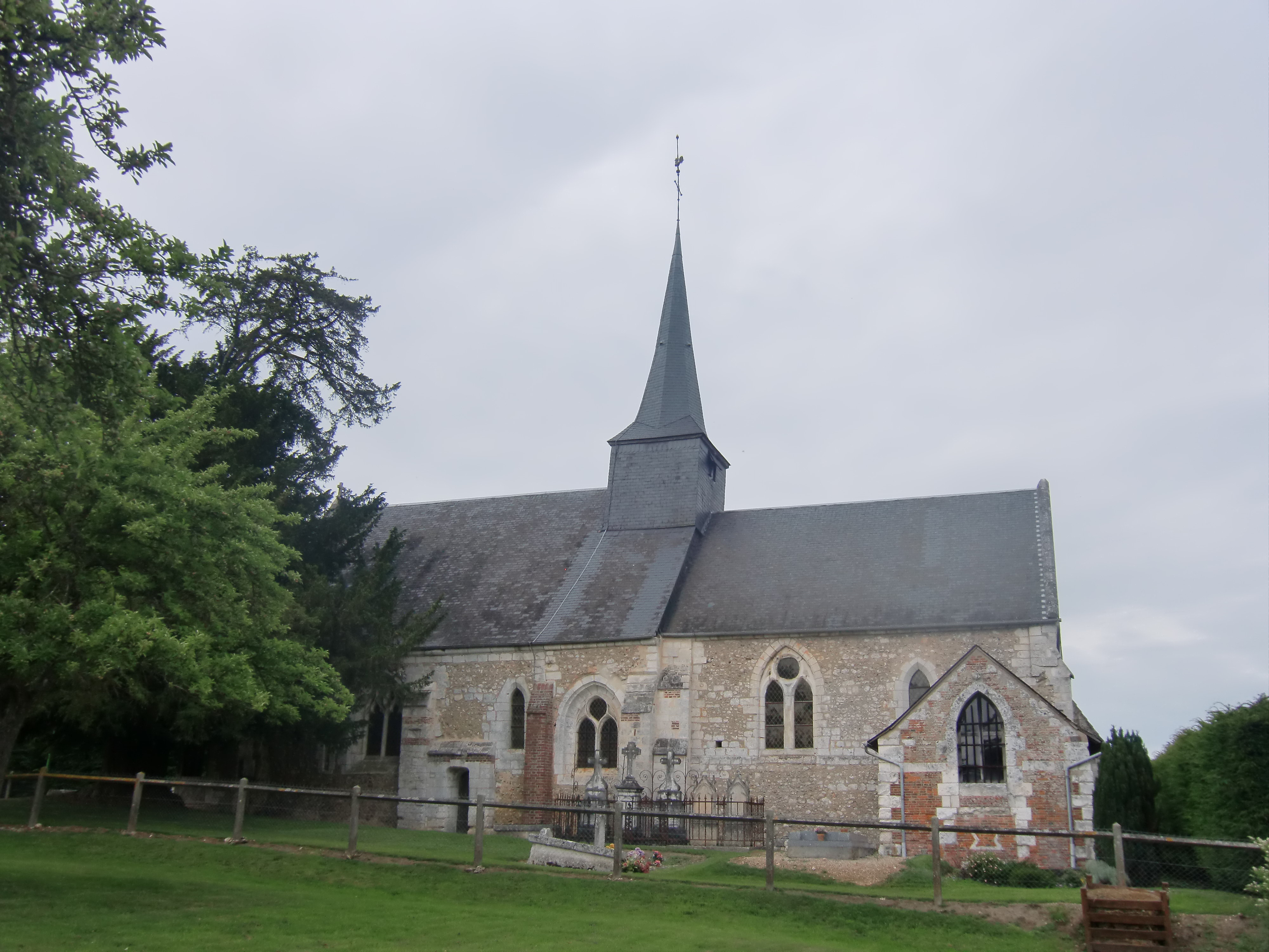 Église de Touville (Eure, Normandie, France)